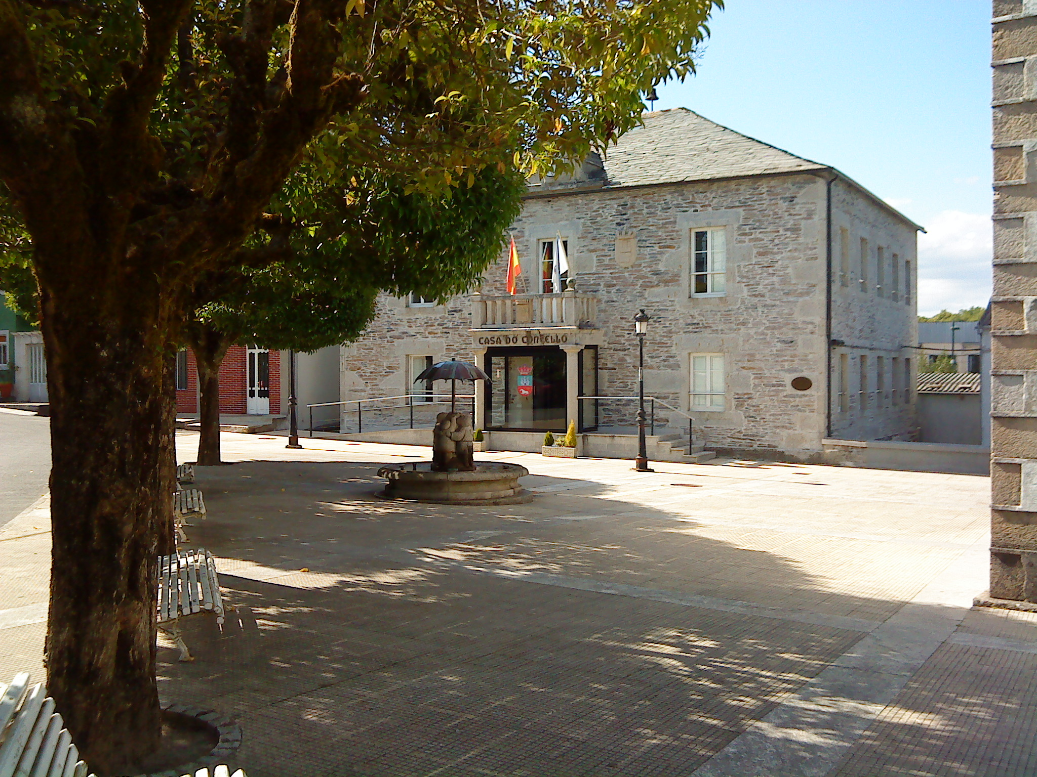 Plaza del Ayuntamiento de Castroverde